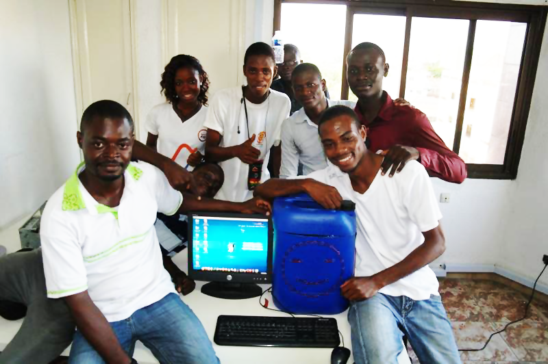 Lors du Jerry Workshop du 17 Mai 2014 la communauté Jerry au Bénin à créer un Jerry Emmabuntüs